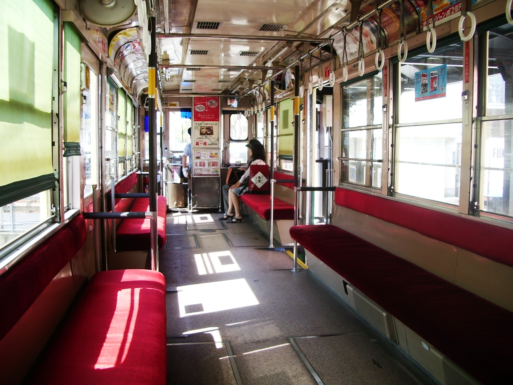 長崎電気軌道500形501車内